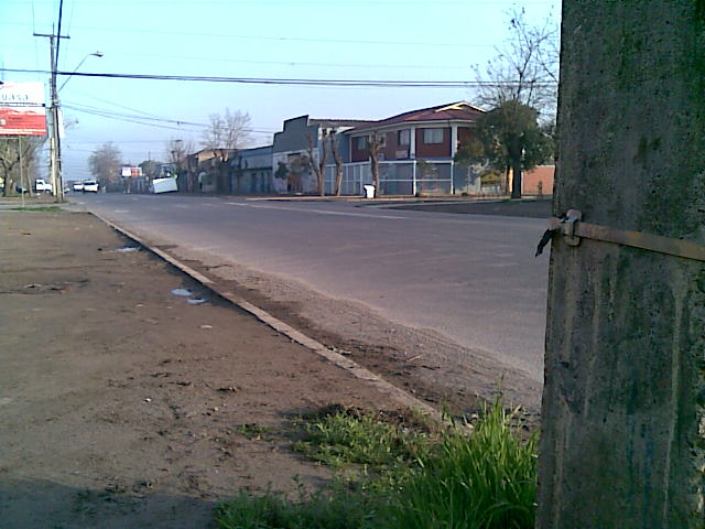 Salvador Guteirrez esq. ALberdi